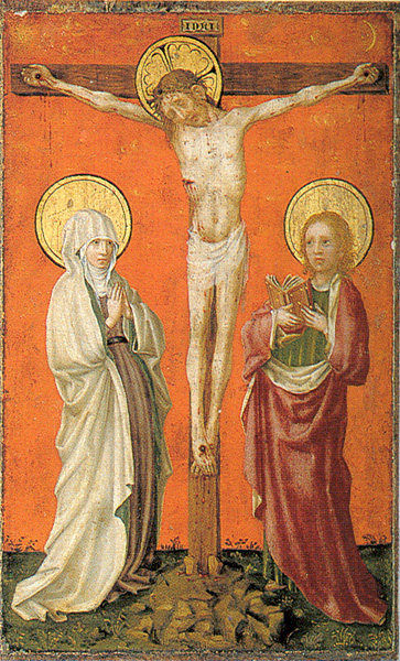 Stefan Lochner, Cruficixion, Munich, Alte Pinakothek